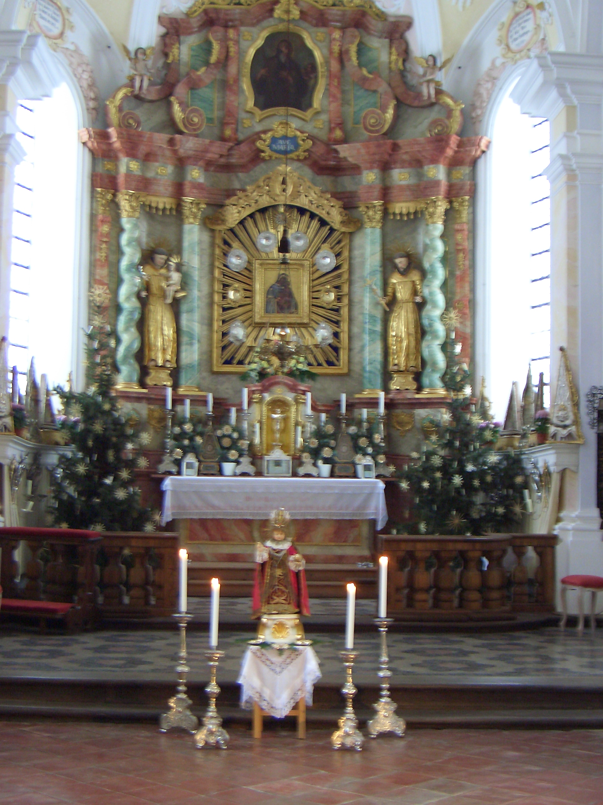 Wallfahrtskirche Mariä Heimsuchung (Kirchwald) Altar